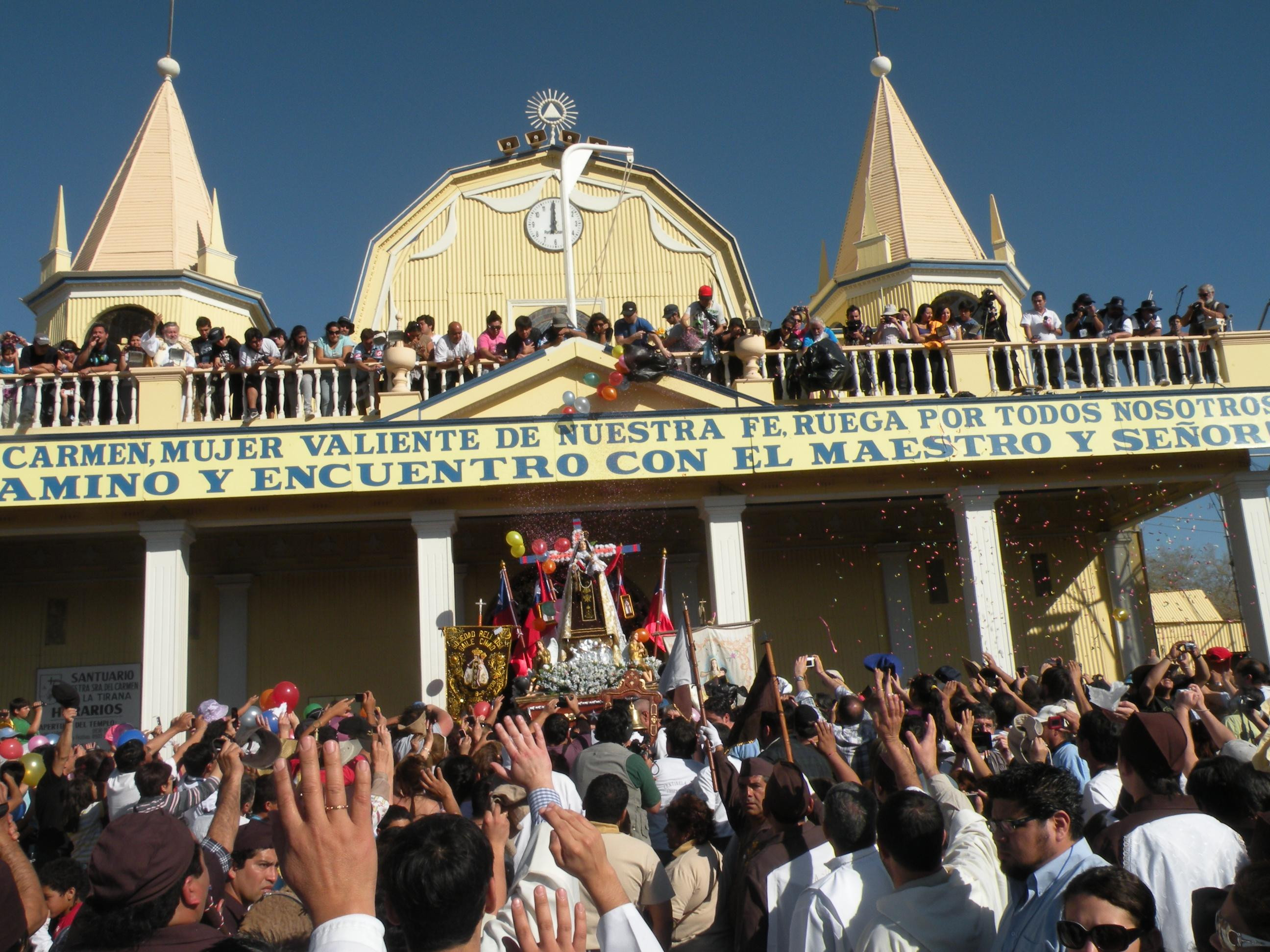 Salida de la Imagen de la Virgen del Carmen del Santuario a la Procesión en el día de su Solemnidad.